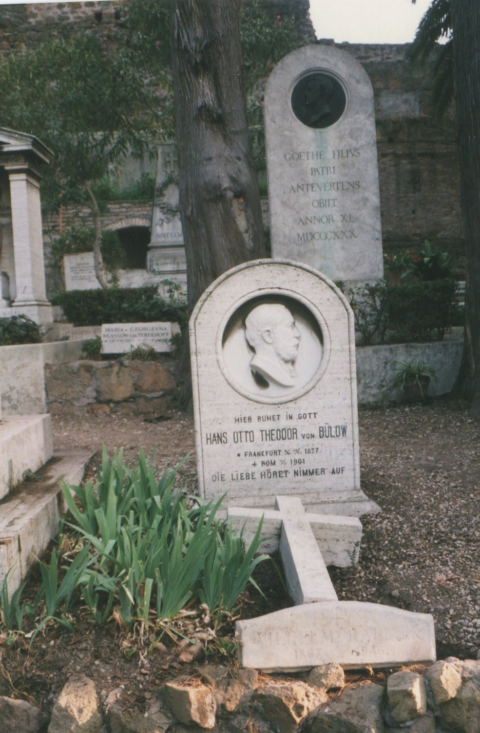 Grabmal Hans Otto Theodor von Bülow auf dem Cimitero acattolico in Rom